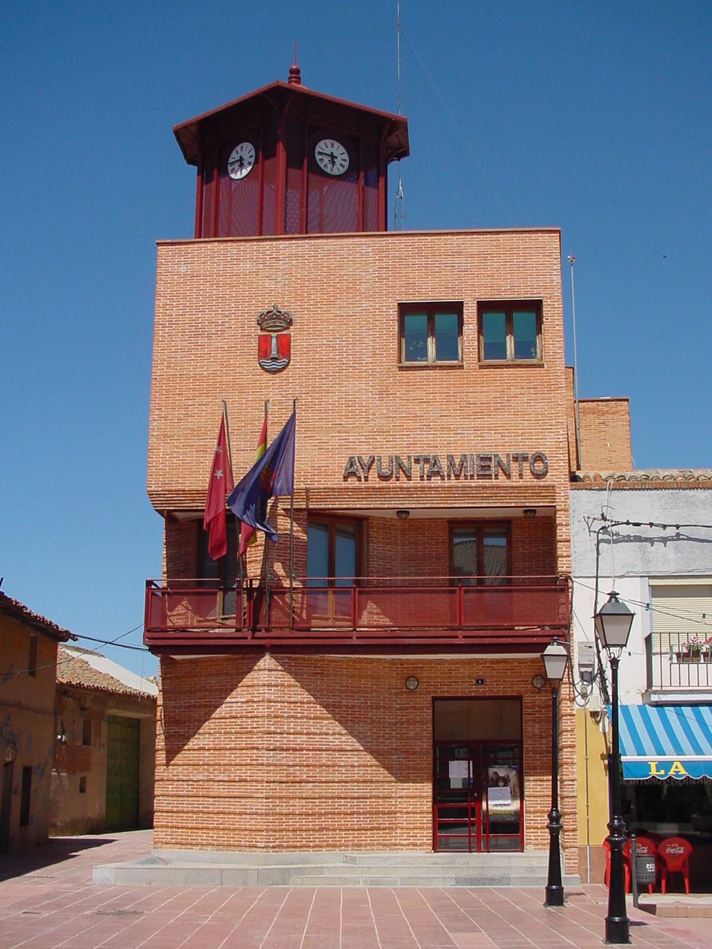 Ayuntamiento de Humanes de Madrid.